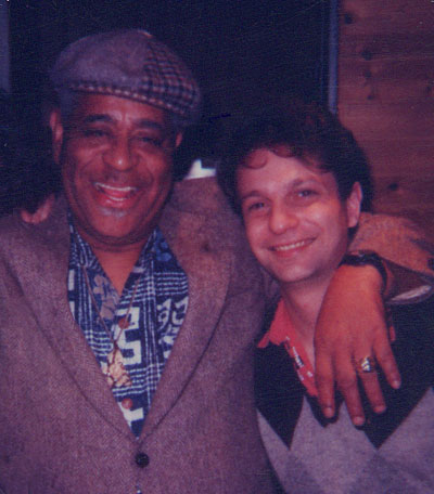 Sergio Caputo e Dizzy Gillespie Giulyfree ha ottenuto l'autorizzazione alla riproduzione su Wikipedia, dal detentore dei diritti, delle fotografie presenti nel sito ufficiale di Sergio Caputo in PD (Pubblico Dominio)